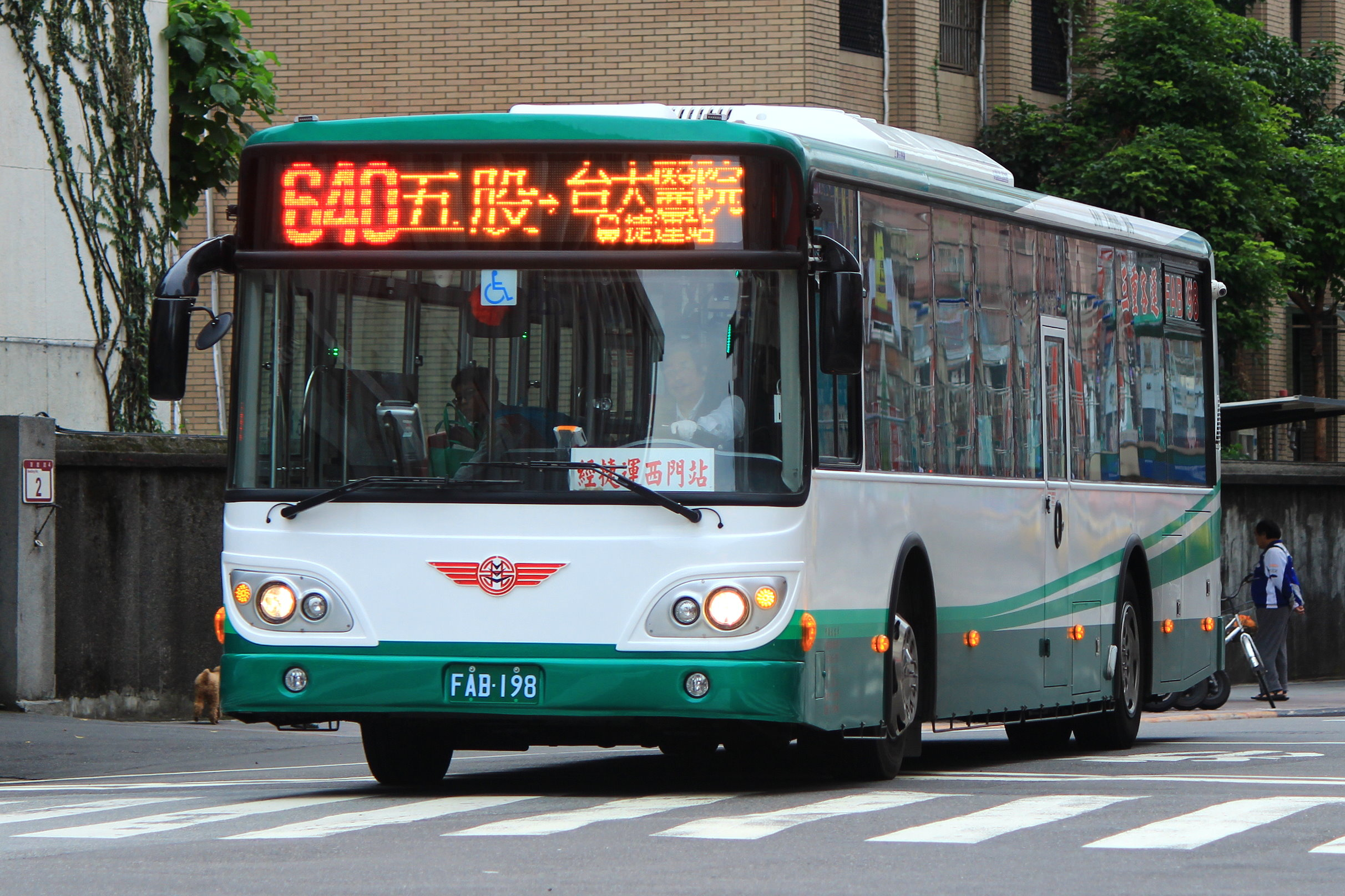 三重客運 FAB-198